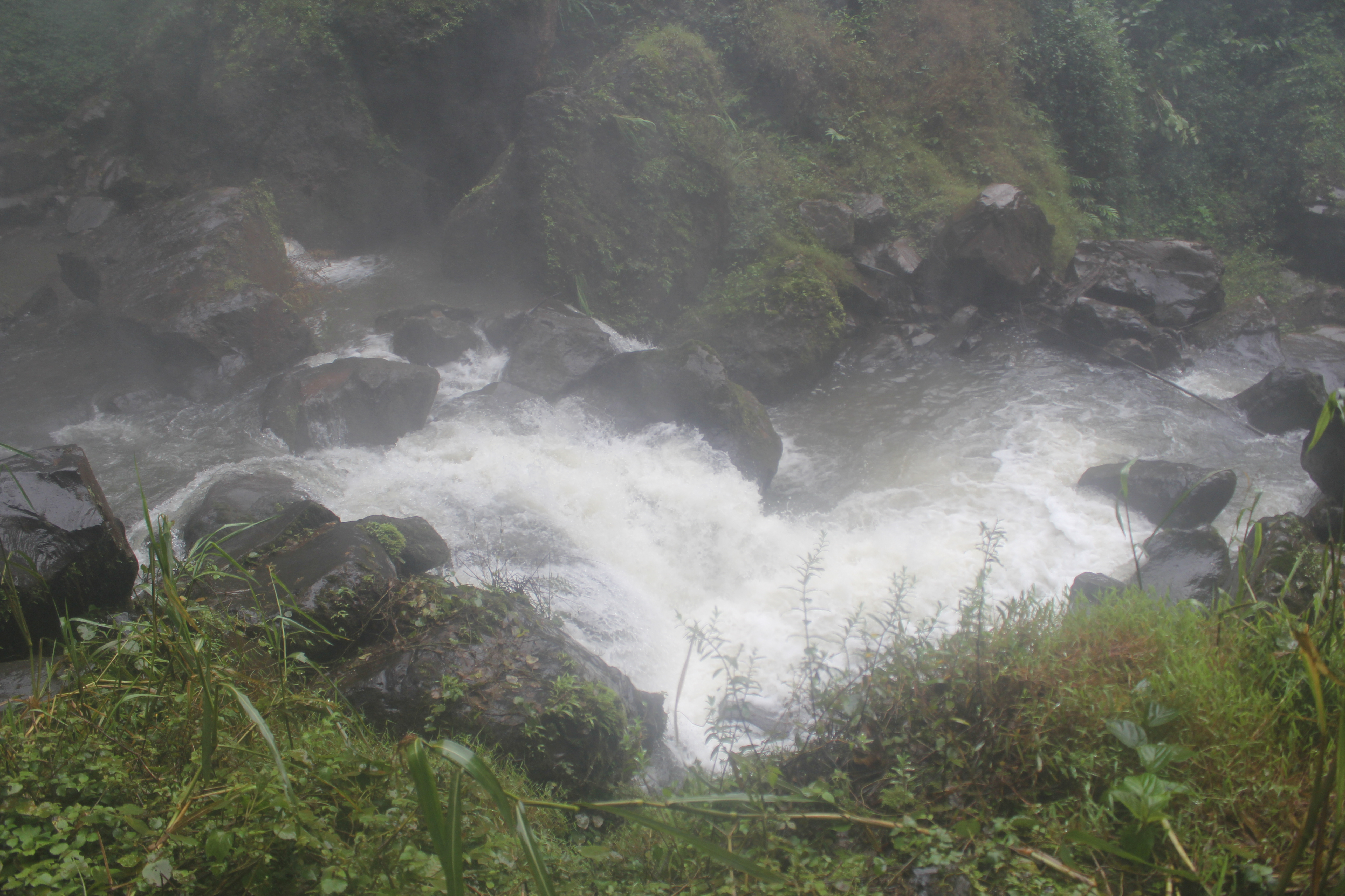 La chute Mamy Wata située à 24km de kilomètres de la ville de Dschang, dans le village de Fongo-Tongo à l'ouest du Cameroun